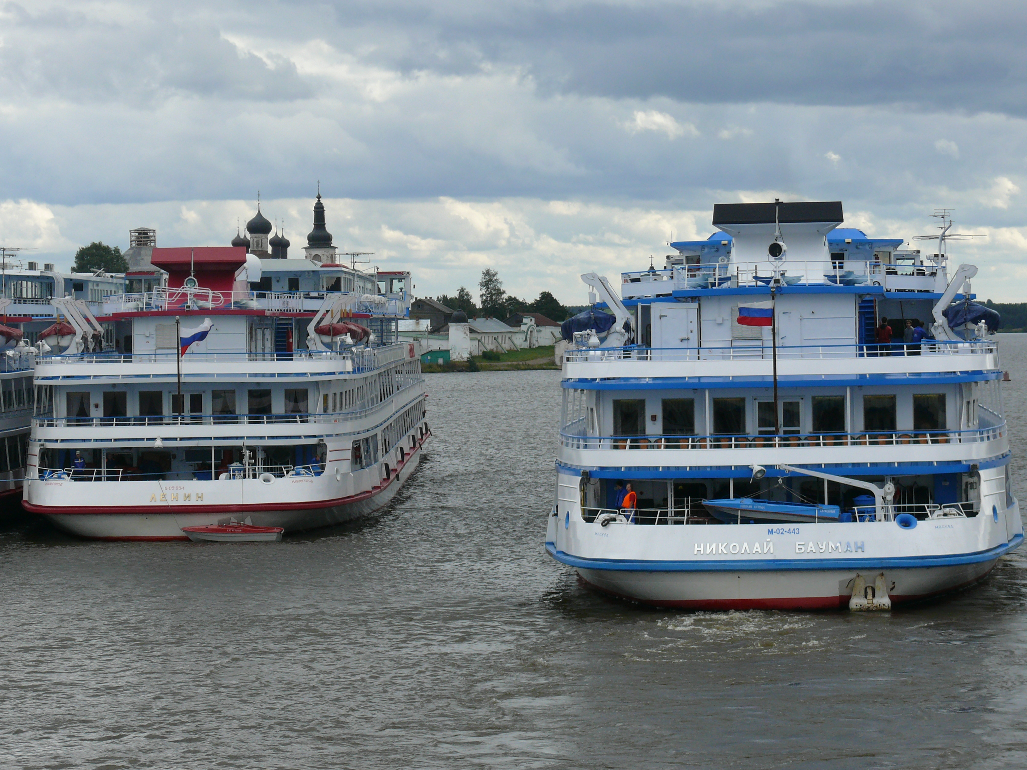 Теплоходы проекта 302 "Ленин" и "Николай Бауман" на Шексне, причаливают к пристани Горицы